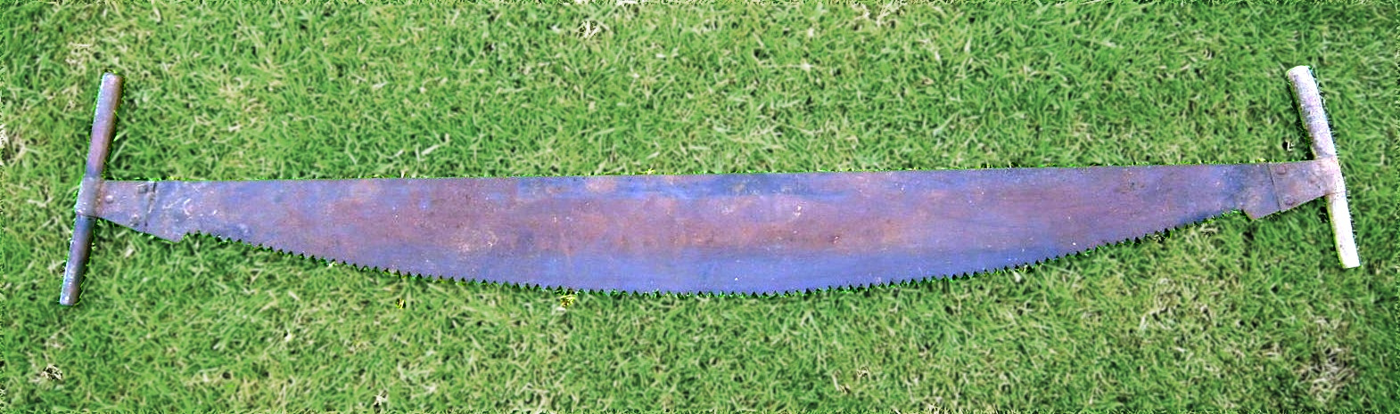 Baumsäge